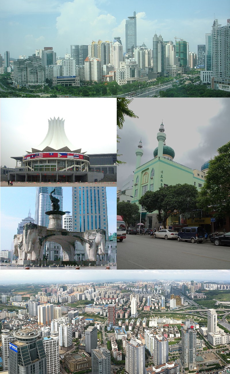 广西区首府南宁市